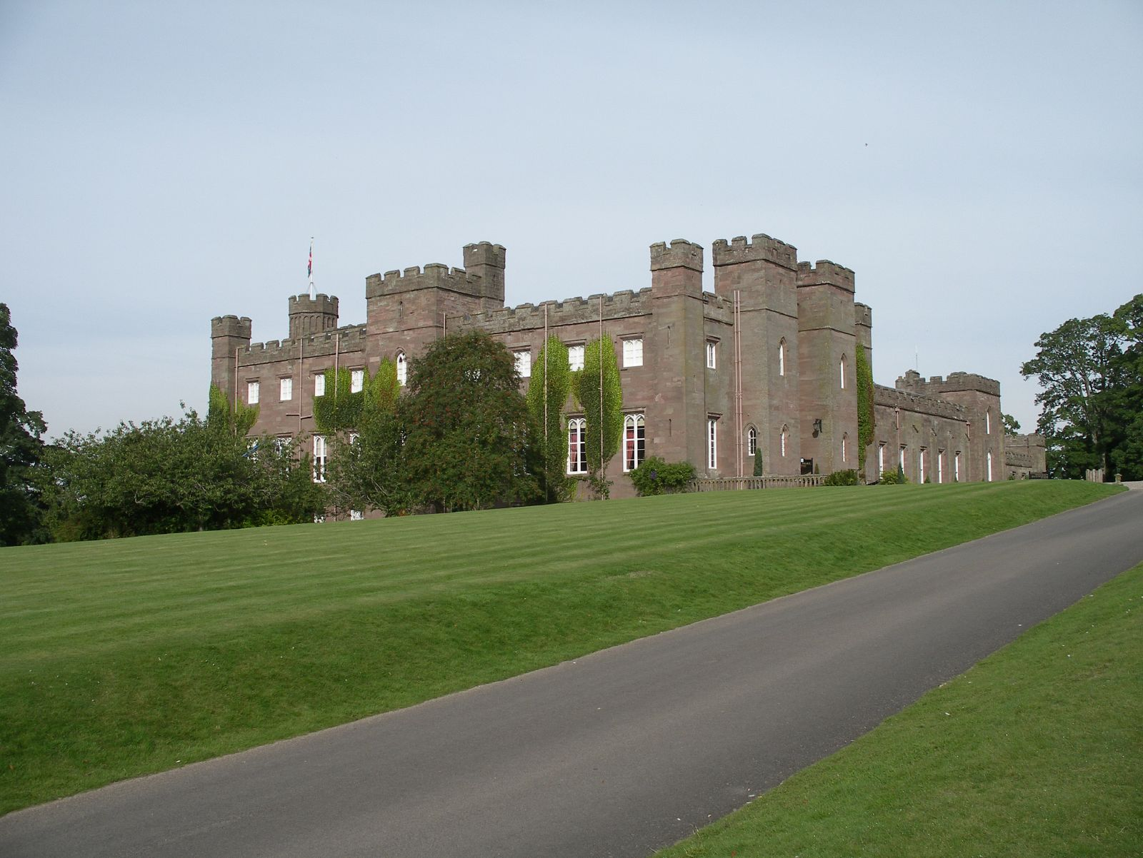 Scone Palace 01